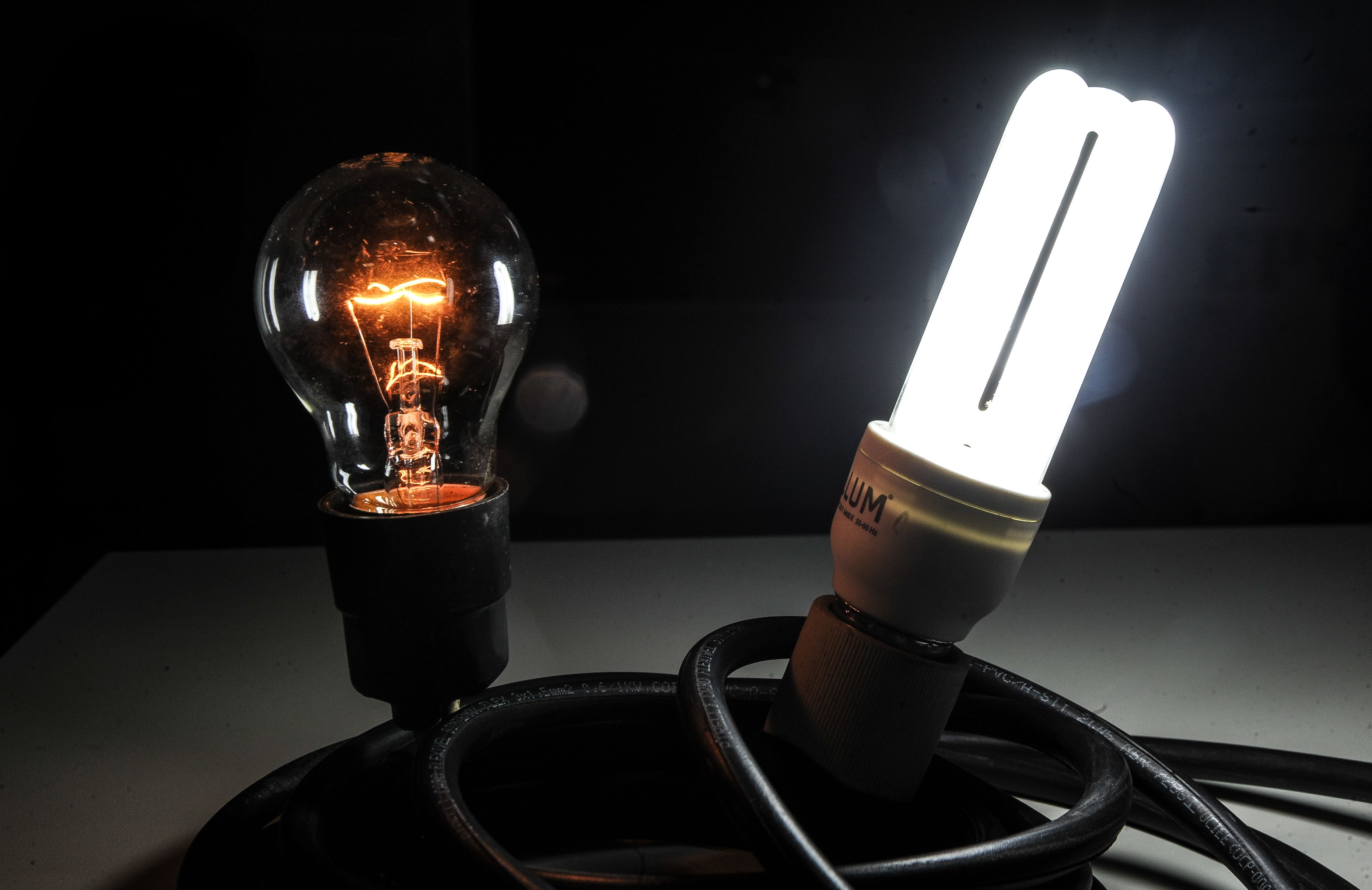 Lâmpada incandescente e fluorescente.